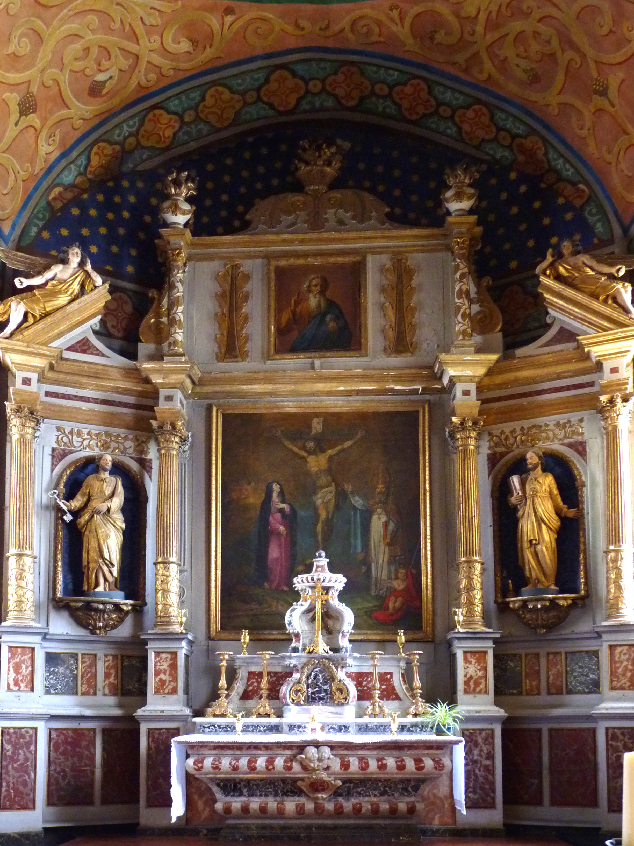 Caupenne (Landes, France), église Saint-Martin, maître-autel avec son tabernacle, et retable avec ses deux toiles: Christ en croix entre la Vierge & Martin-de-Tours, et Dieu-le-Père, ainsi que ses deux statues grandeur nature: St Pierre & St Paul.